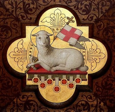 Imagen del Cordero de Dios que quita los pecados del mundo